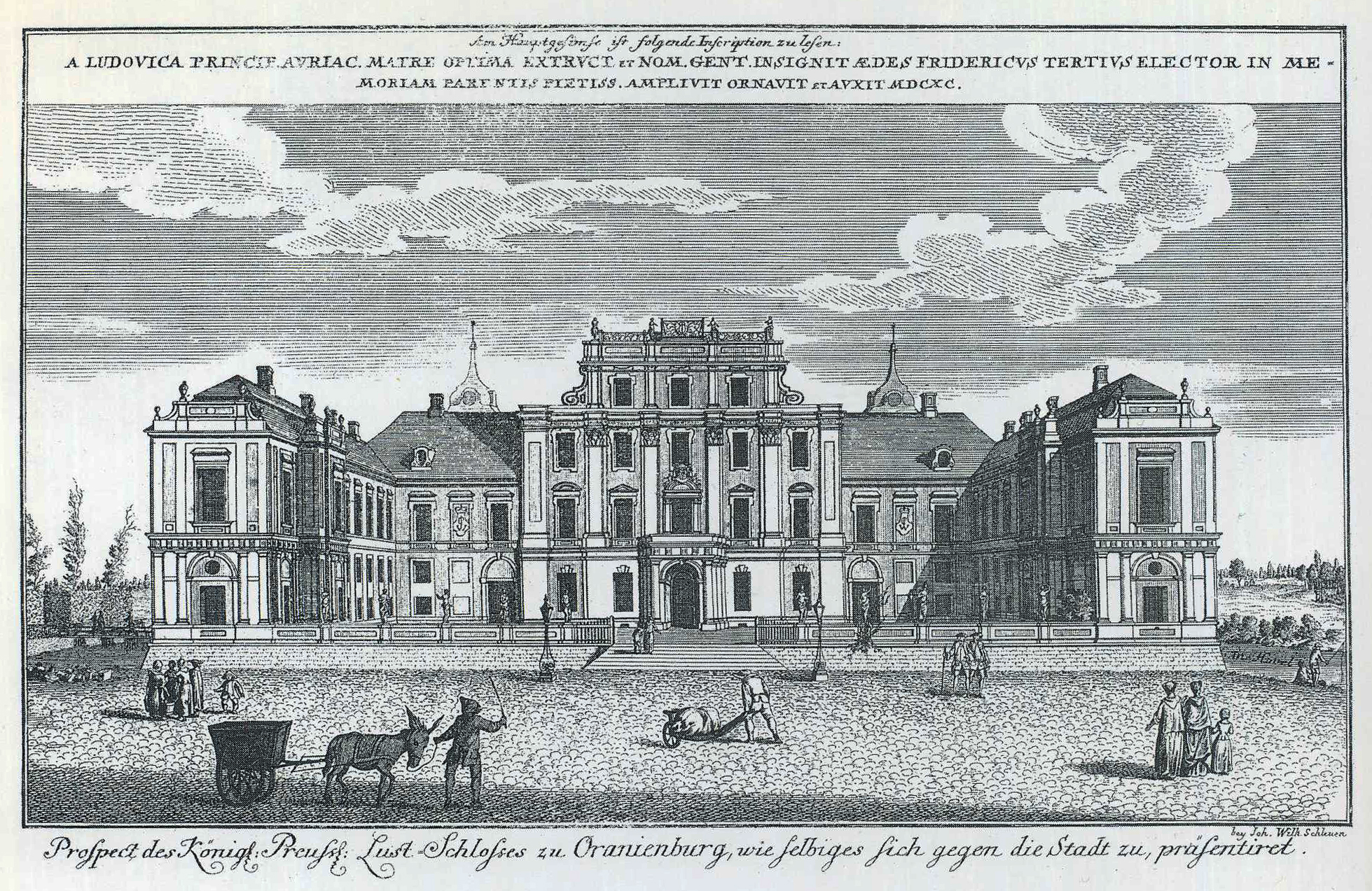 Ansicht der Stadtseite des Schlosses Oranienburg